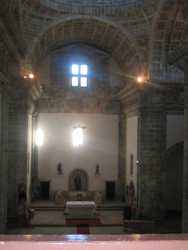 Foto do Mosteiro de Monfero, na Galiza